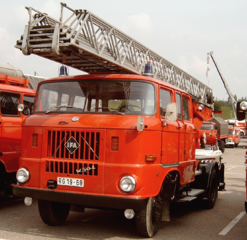 Drehleiter mit 30 m Rettungshöhe auf IFA W50 L Fahrgestell.